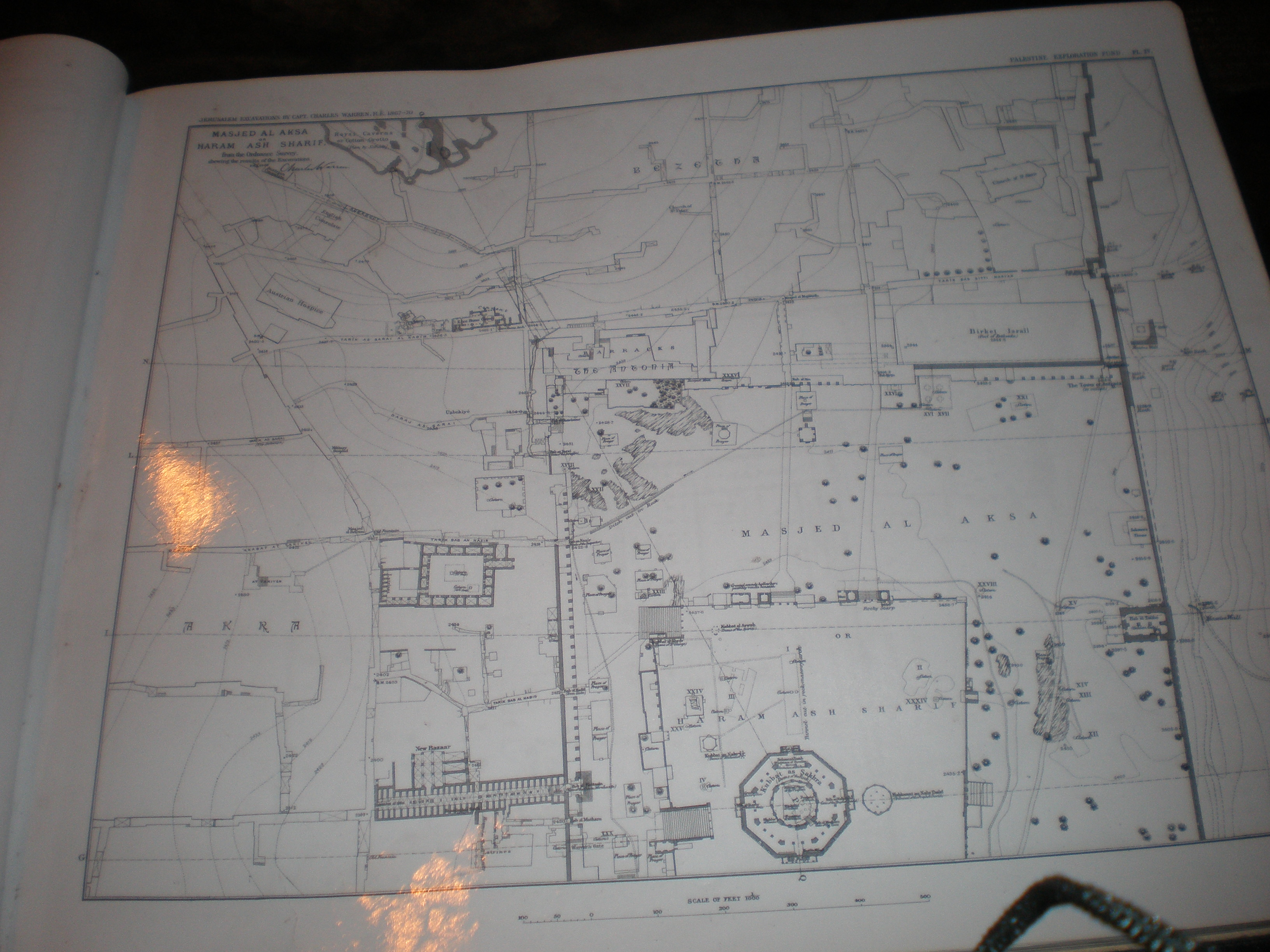 שרטוט מפת הר הבית מאת he:צ'ארלס וורן